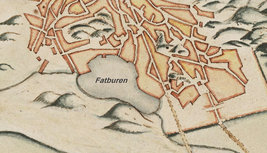 Del av karta över Stockholm, visande sjön Fatburen på Södermalm